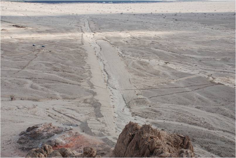 Desert Kite Archaeology Sites in the Negev South of Israel Dated8,300-4,500BC עפיפוני המדבר הינם מתקנים ששימשו לצייד המוני של עדרי חיות בר. עפיפוני המדבר ידועים היום בארבע מוקדים מרכזיים במזרח התיכון: עפיפוני הנגב, הערבה וסיני, עפיפוני מזרח ירדן, עפיפוני ערב הסעודית ועפיפוני המדבר הסוריה. ניתן לראות כי עפיפוני הנגב, הערבה וסיני הם קטנים יחסית בממדיהם, בעוד שעפיפוני ירדן וסוריה הם גדולים מאוד ונבנו לרוב בשרשראות. בעפיפוני סוריה ערב הסעודית ניתן לראות דבר שונה מעט, כאשר לעיתים ניתן לראות עפיפון אחד עם מספר בורות הריגה. האתרים מתוארכים לשנים 8,300-4,500 לפני הספירה עפיפוני מדבר ממערב לקיבוץ סמר השוכן ליד אילת